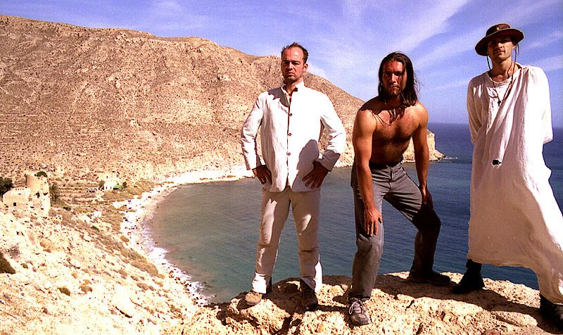 Mono für Alle! über der Bucht von San Pedro (Spanien)